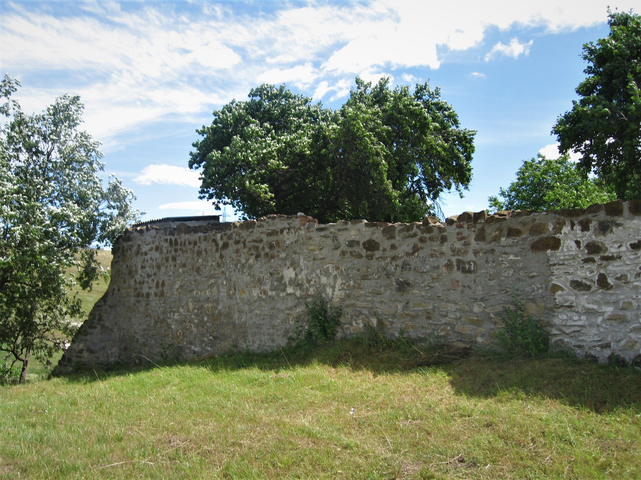 Mănăstirea Hagigadar